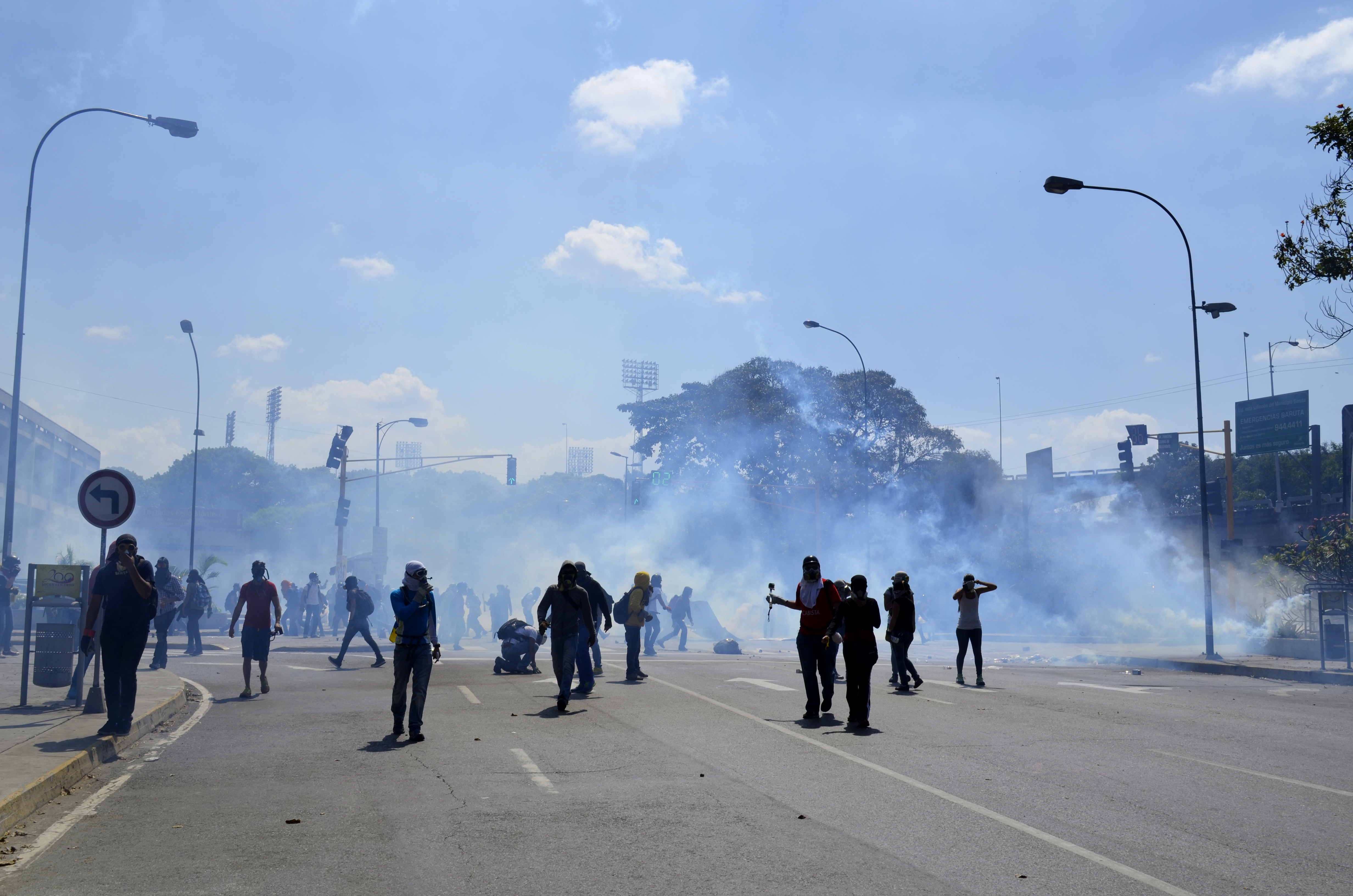 Se intentó marchar hasta Plaza Venezuela, pero después de mucho serpentear evitando uno y otro piquete de PNB bloqueado el recorrido, el enfrentamiento fue inevitable en Bello Monte.